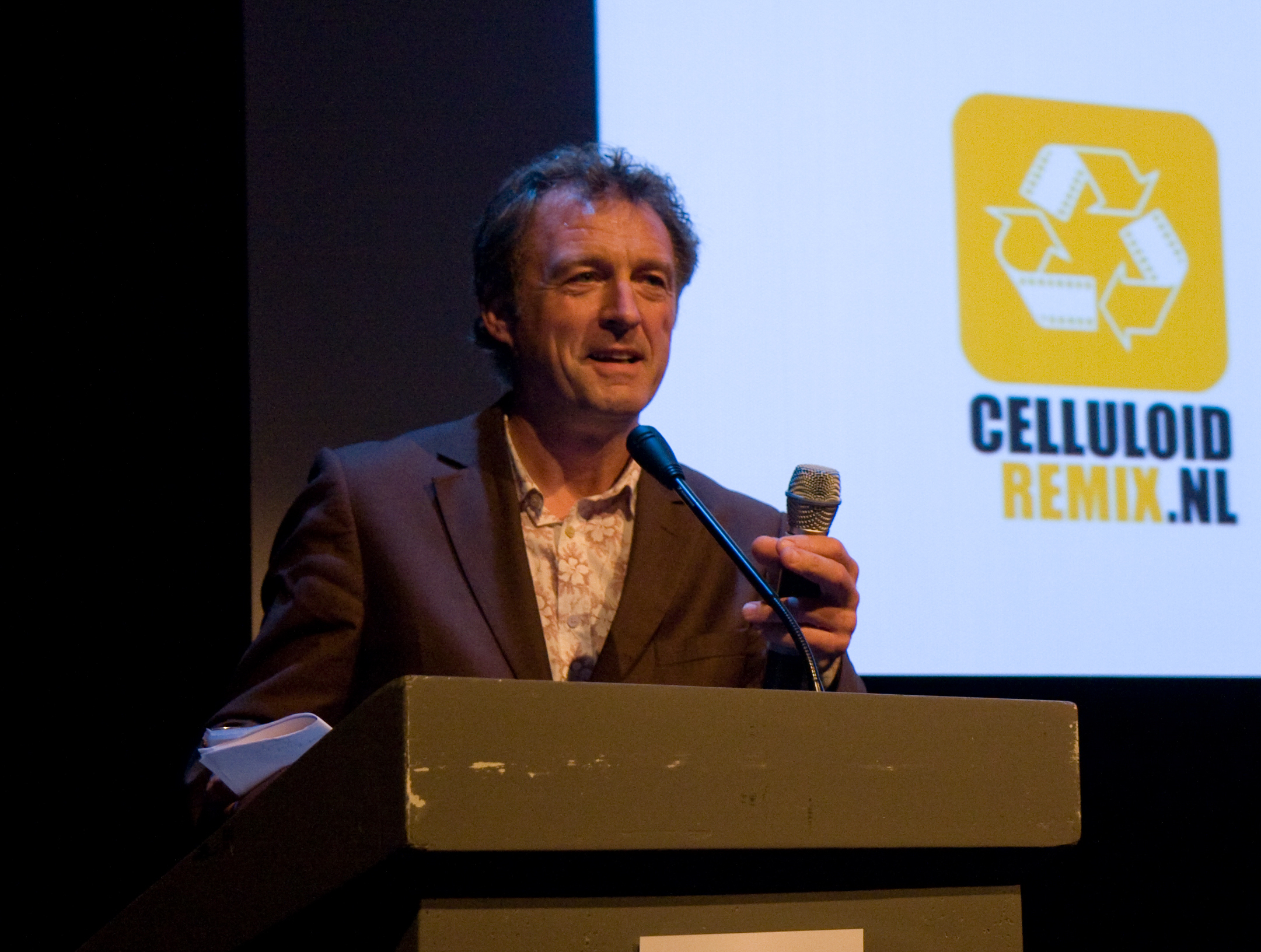 Zakelijk directeur IFFR